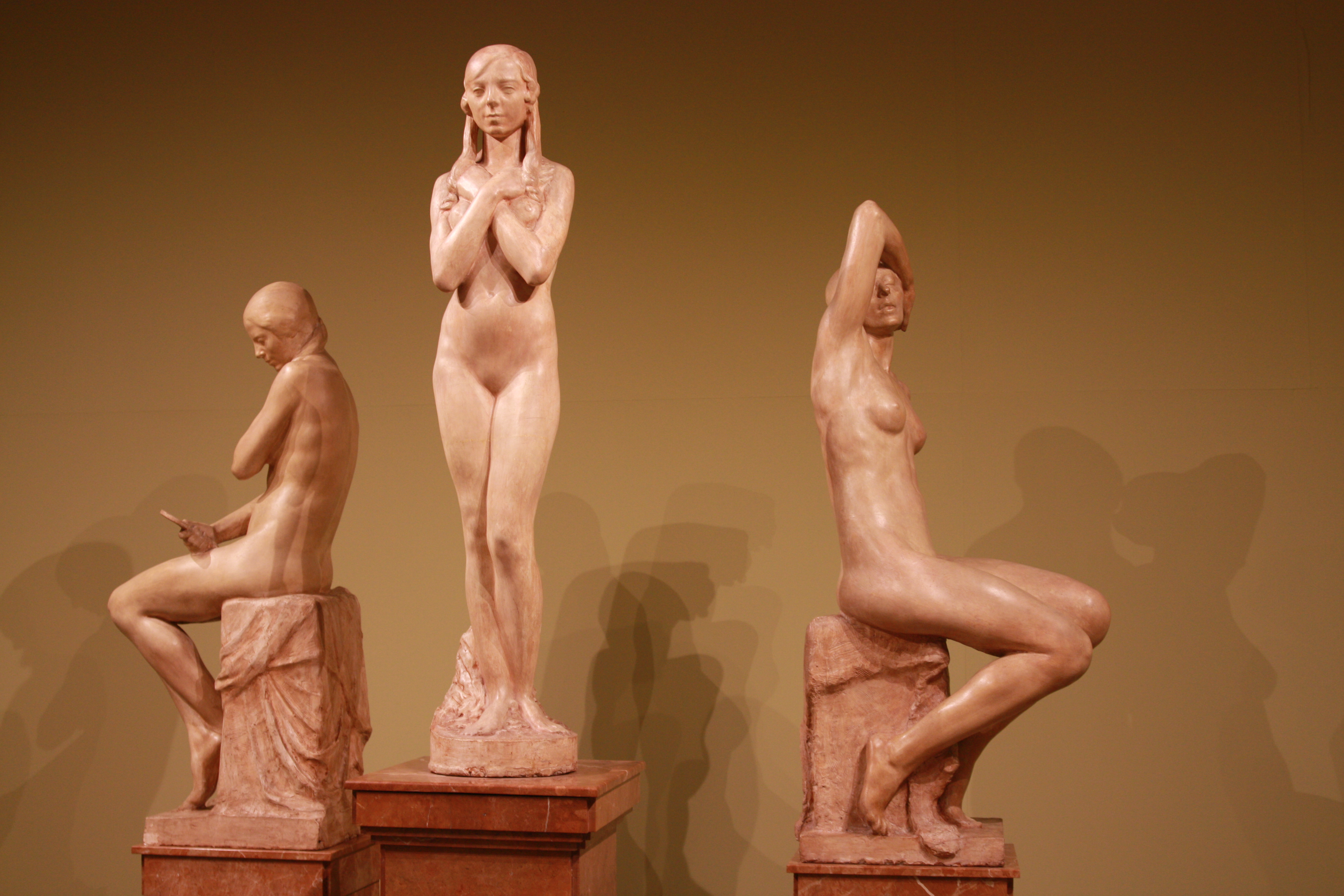 Las tres edades de la mujer de Mateo Inurria. Museo de Bellas Artes de Córdoba (España).